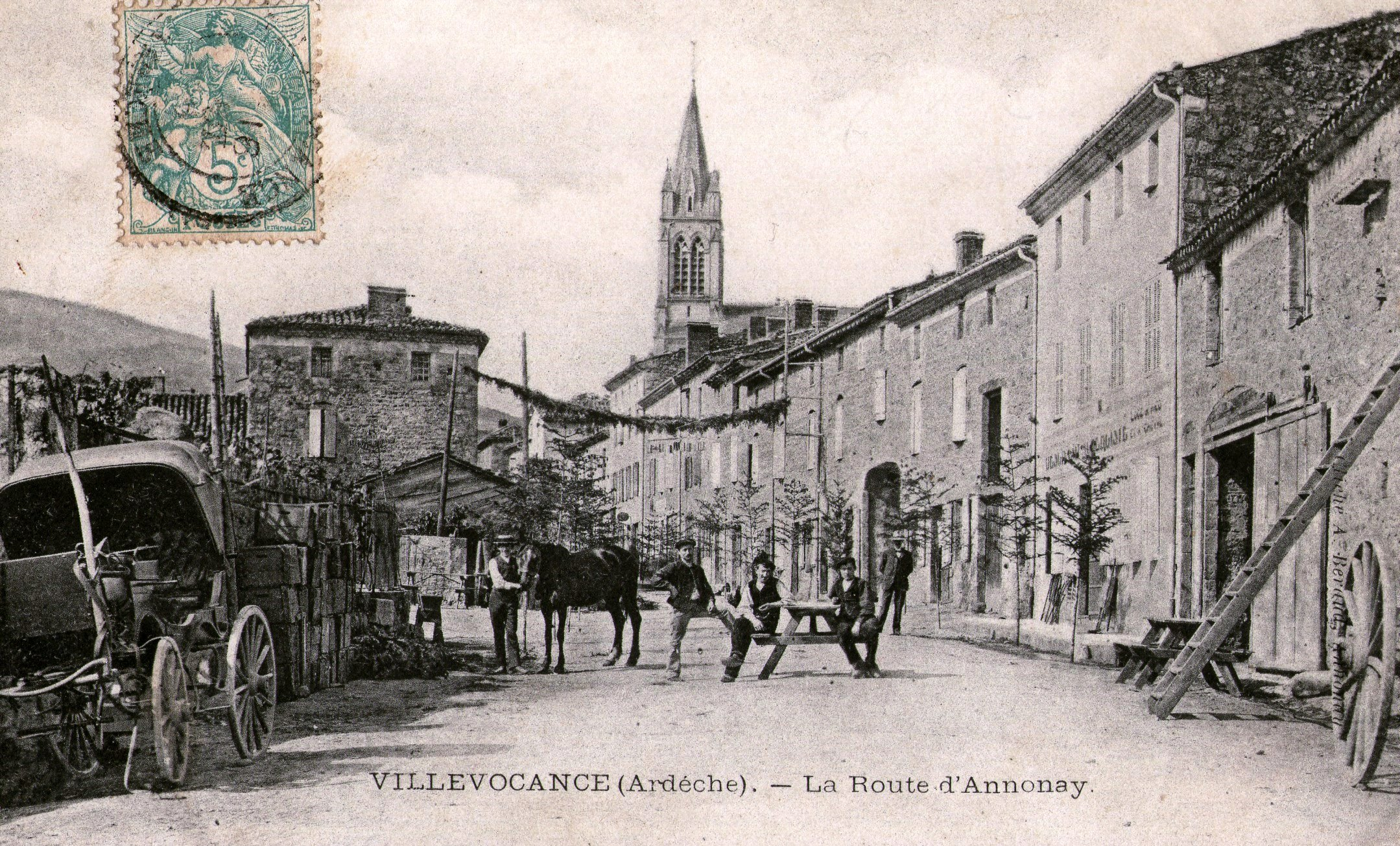 Villevocance entrée 1906